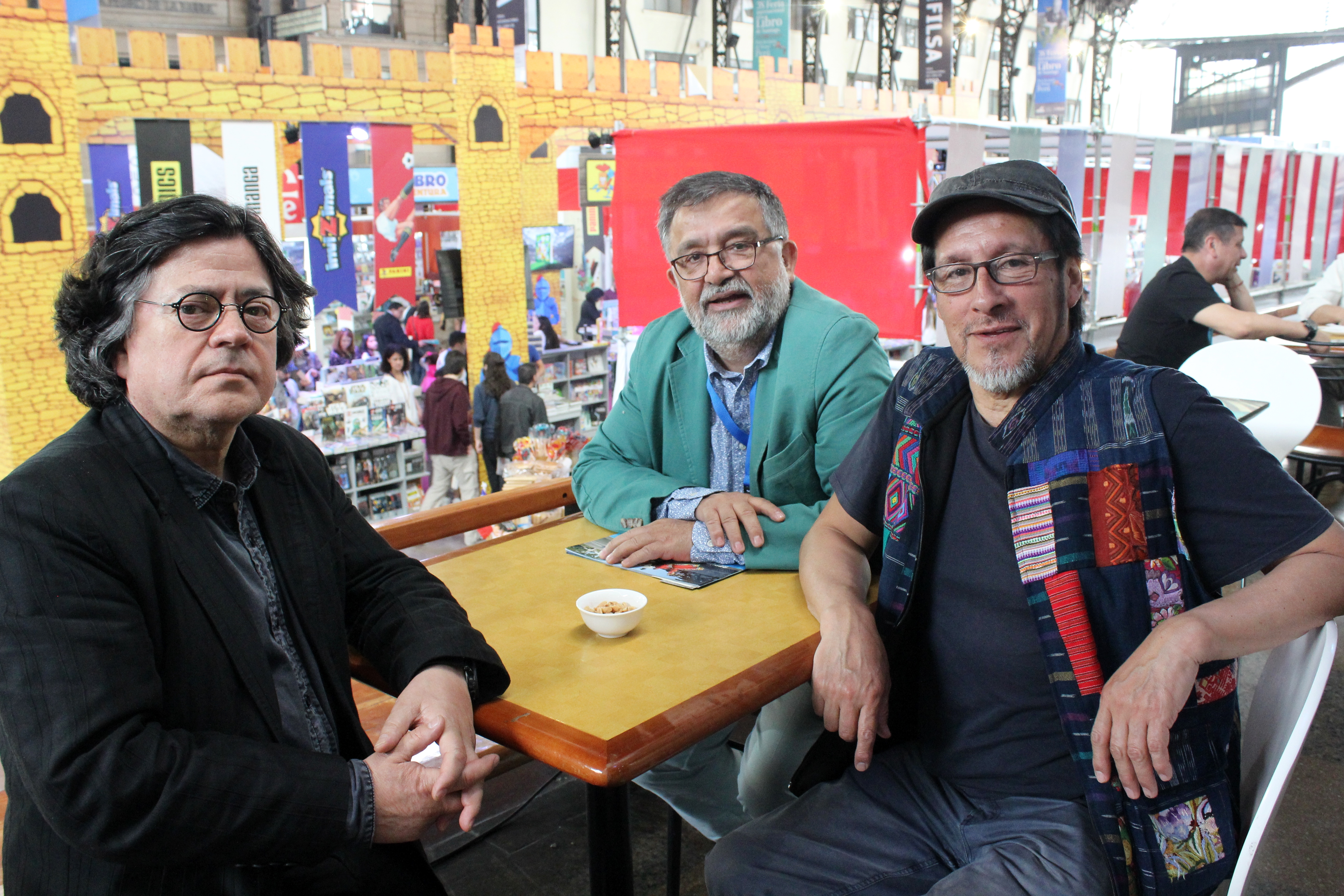 El poeta chileno mapuche Elicura Chihuailaf (1º derecha), con Luis Abarzúa (2º der.), de la Universidad de La Frontera, y … en la Feria Internacional del Libro de Santiago 2018.